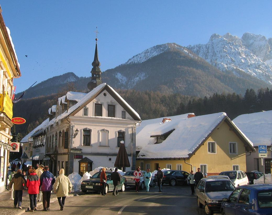 Kranjska Gora photo:Ziga 09:22, 7 November 2006 (UTC)